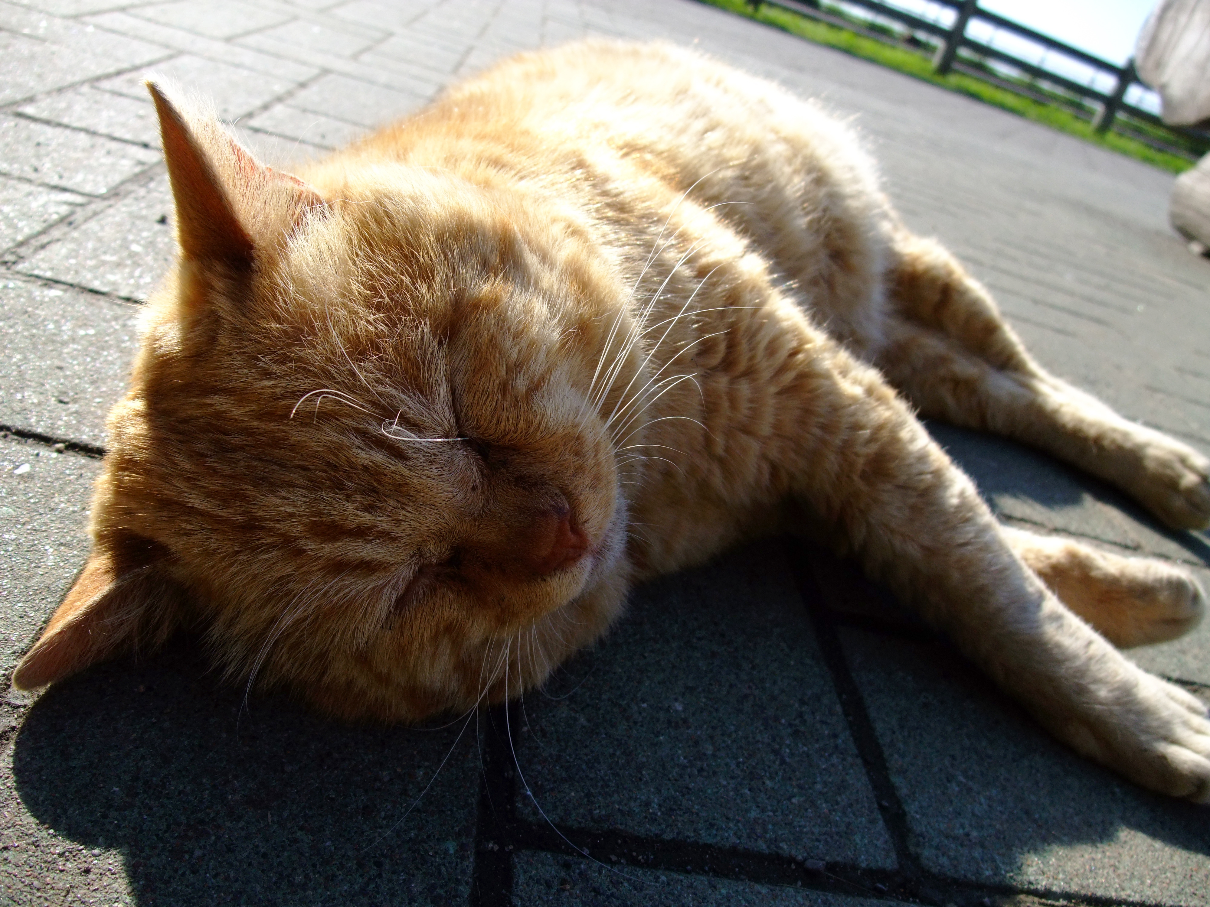 オシンコシンの滝の猫「ノラの昼寝」